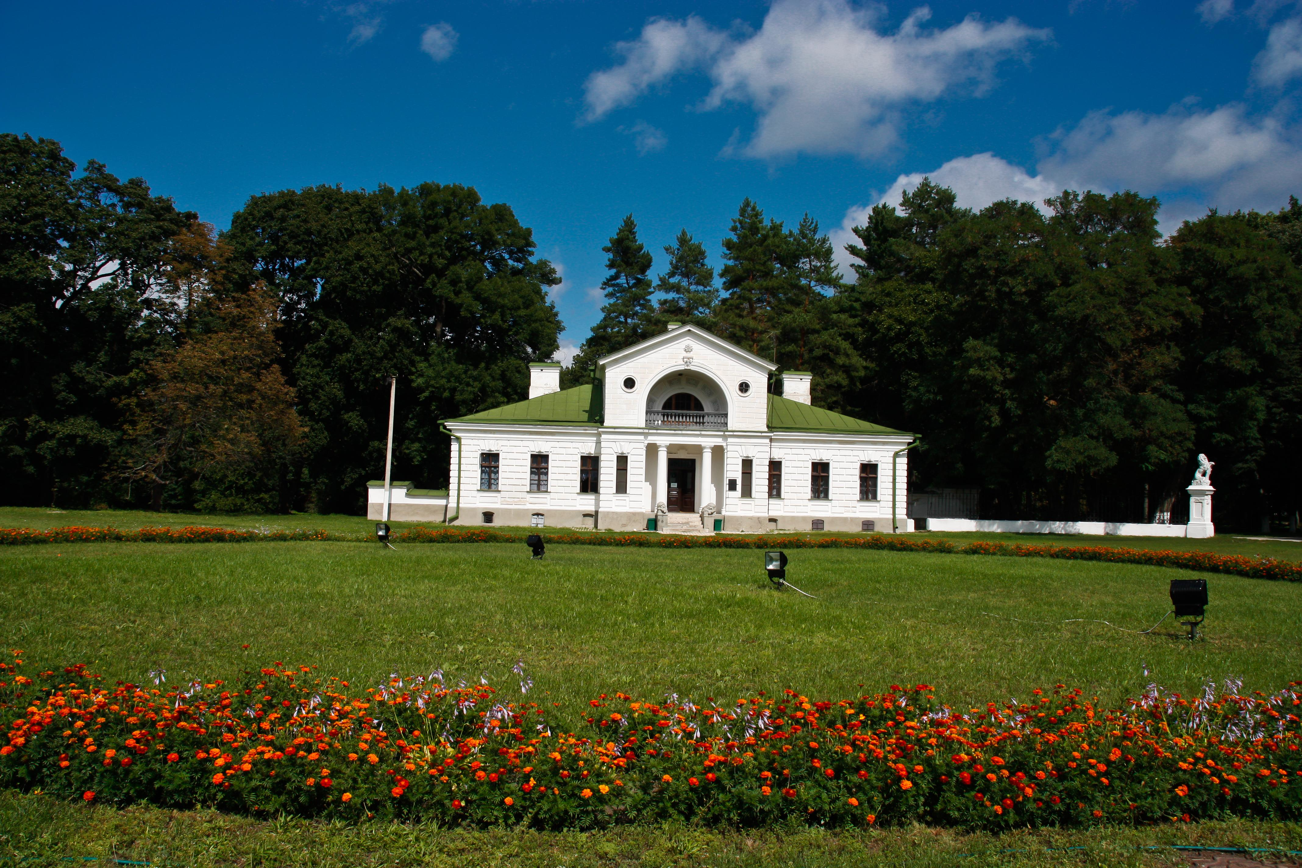 Комплекс споруд садиби "Качанiвка", Качанівка